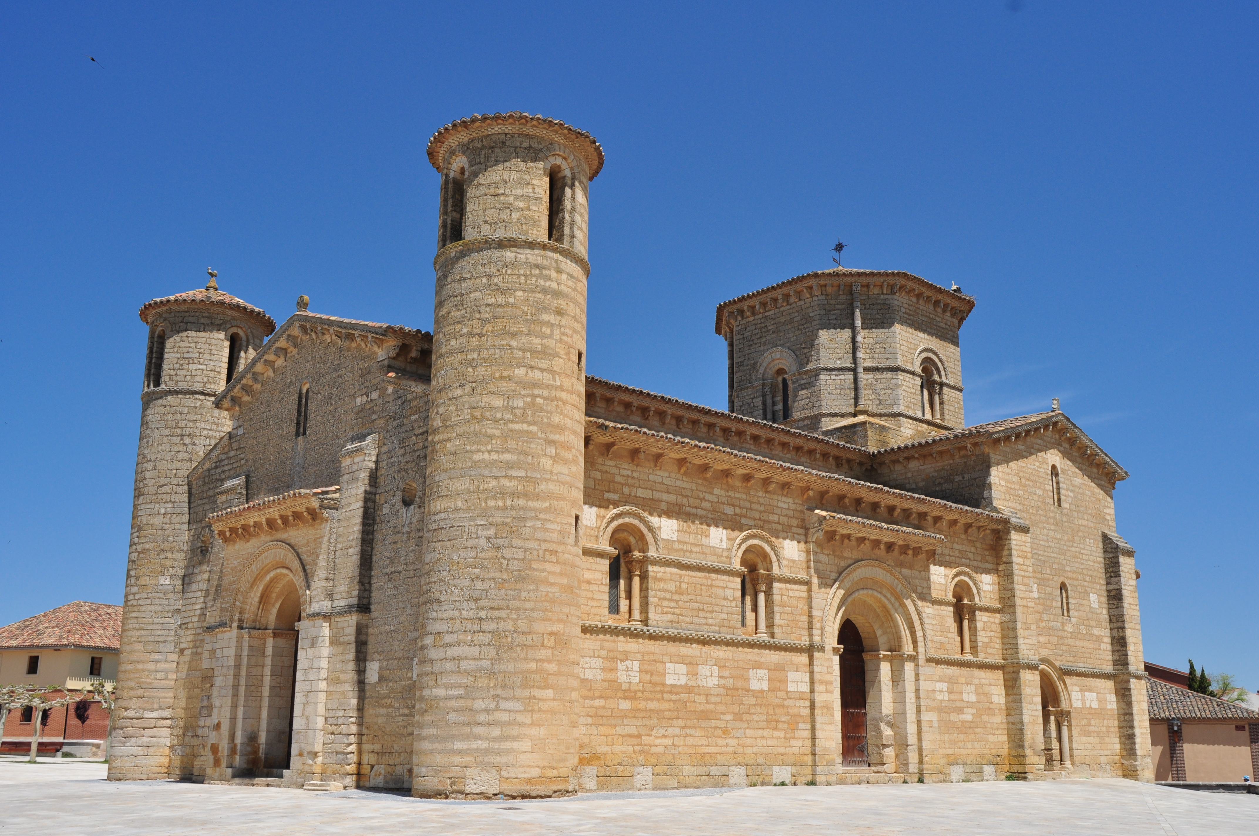 Fromista - 003